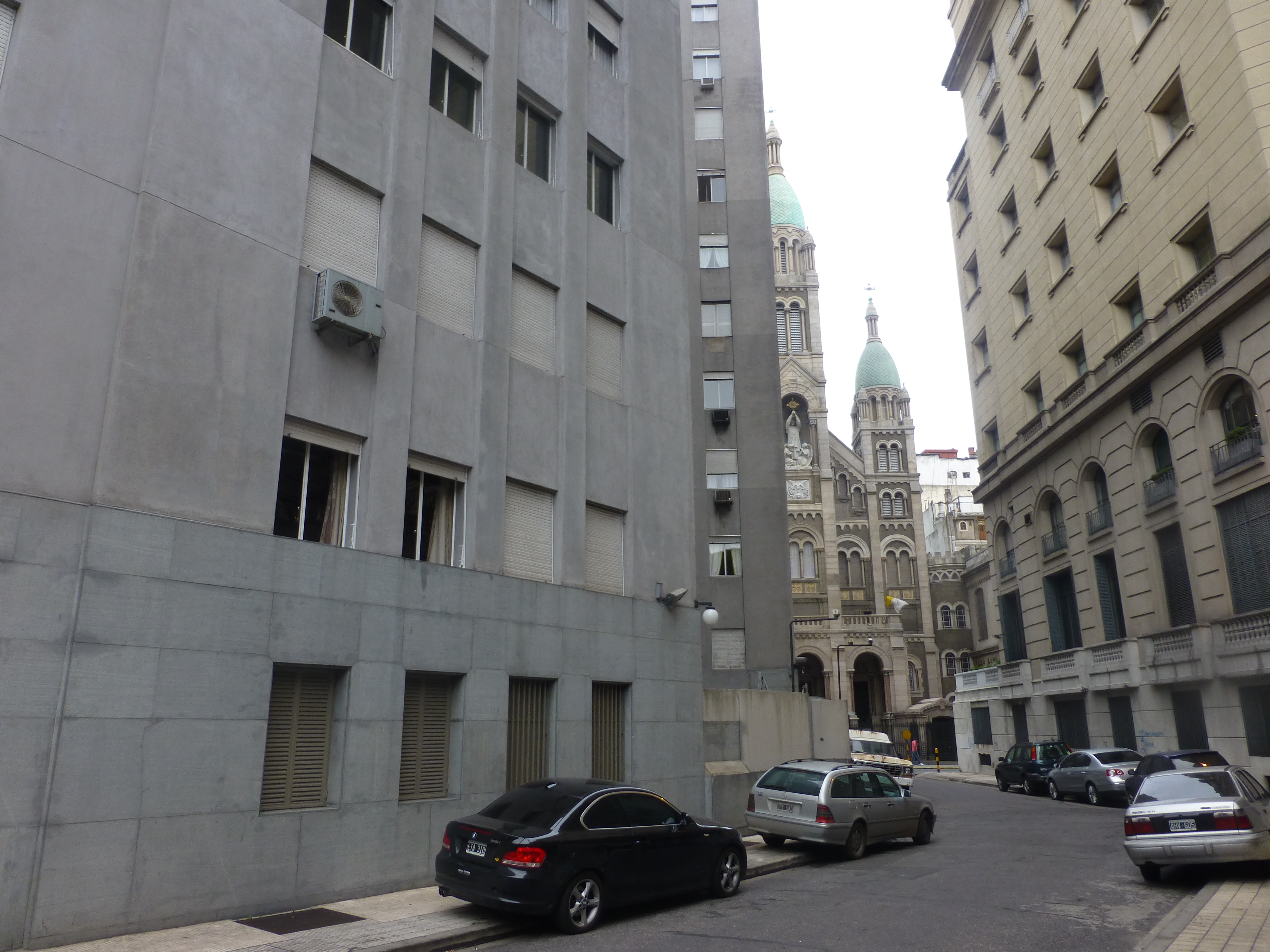 Pasaje Kavanagh, que comunica San Martín con Florida, entre Ricardo Rojas y Marcelo T., en el barrio porteño de Retiro.